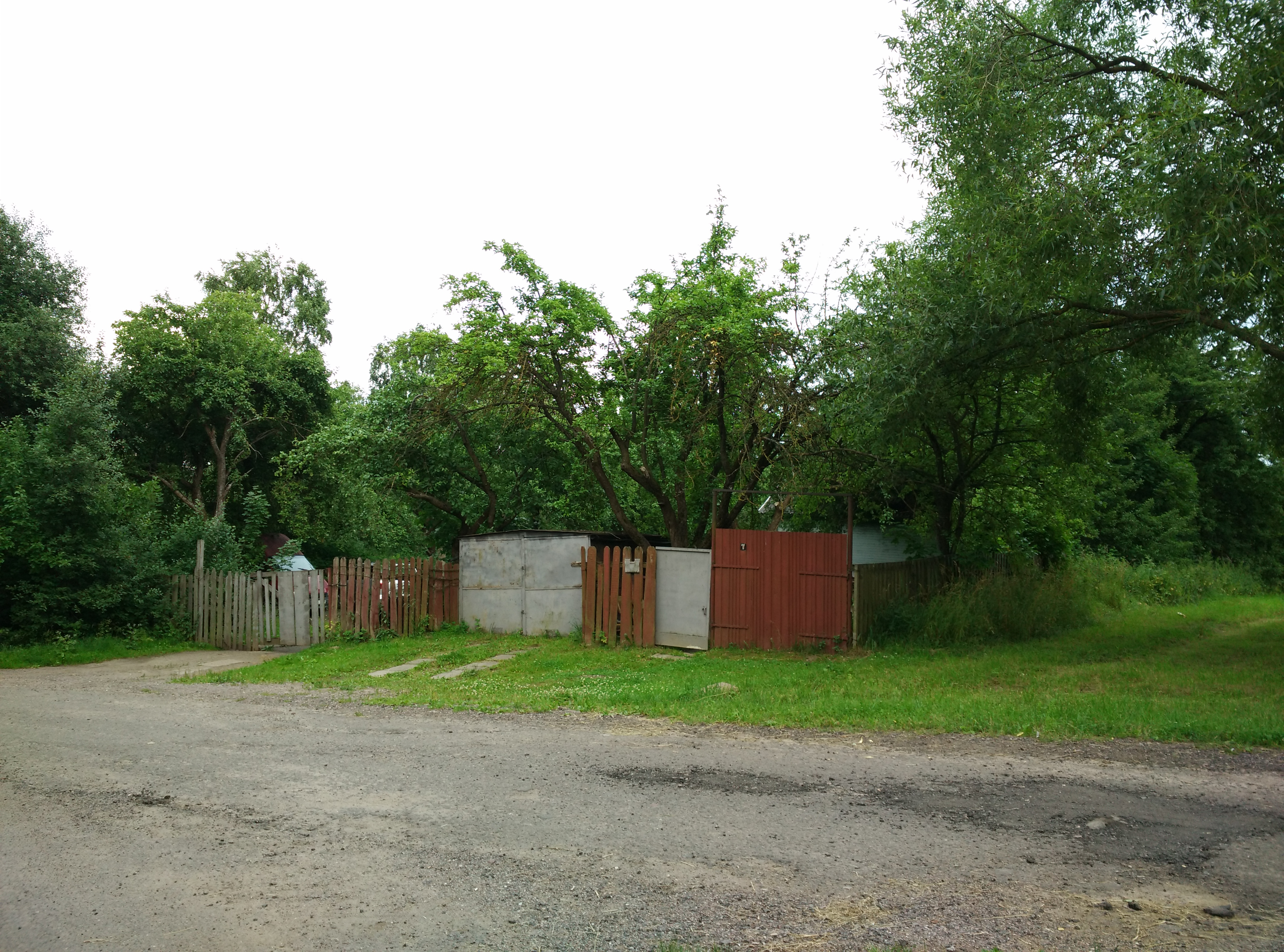 Вёска Маляўкі, Менск. Вуліца Маляўкі.